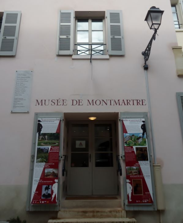 L'entrée du musée de Montmartre